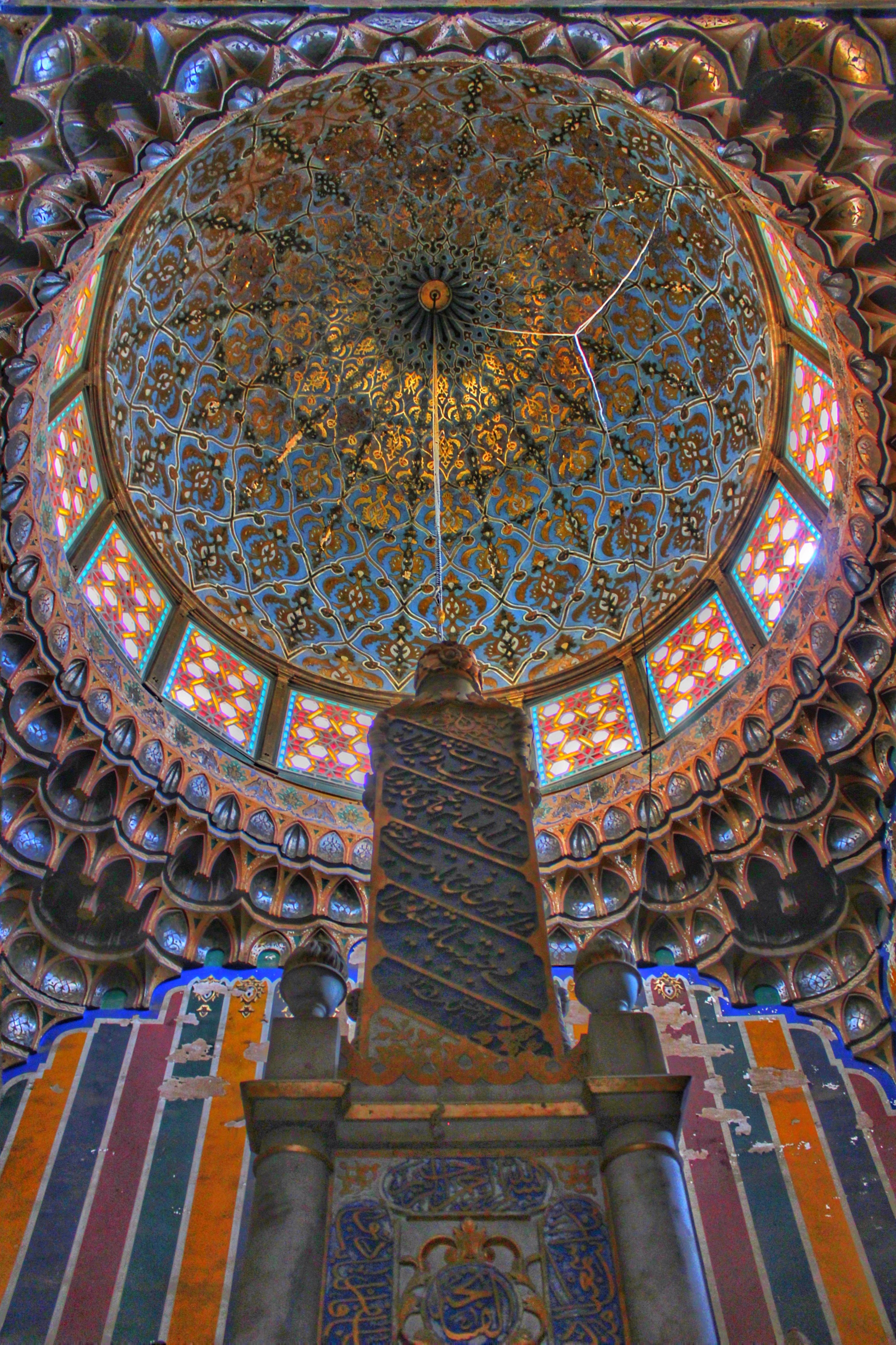 صور لاماكن أثريه بمصر